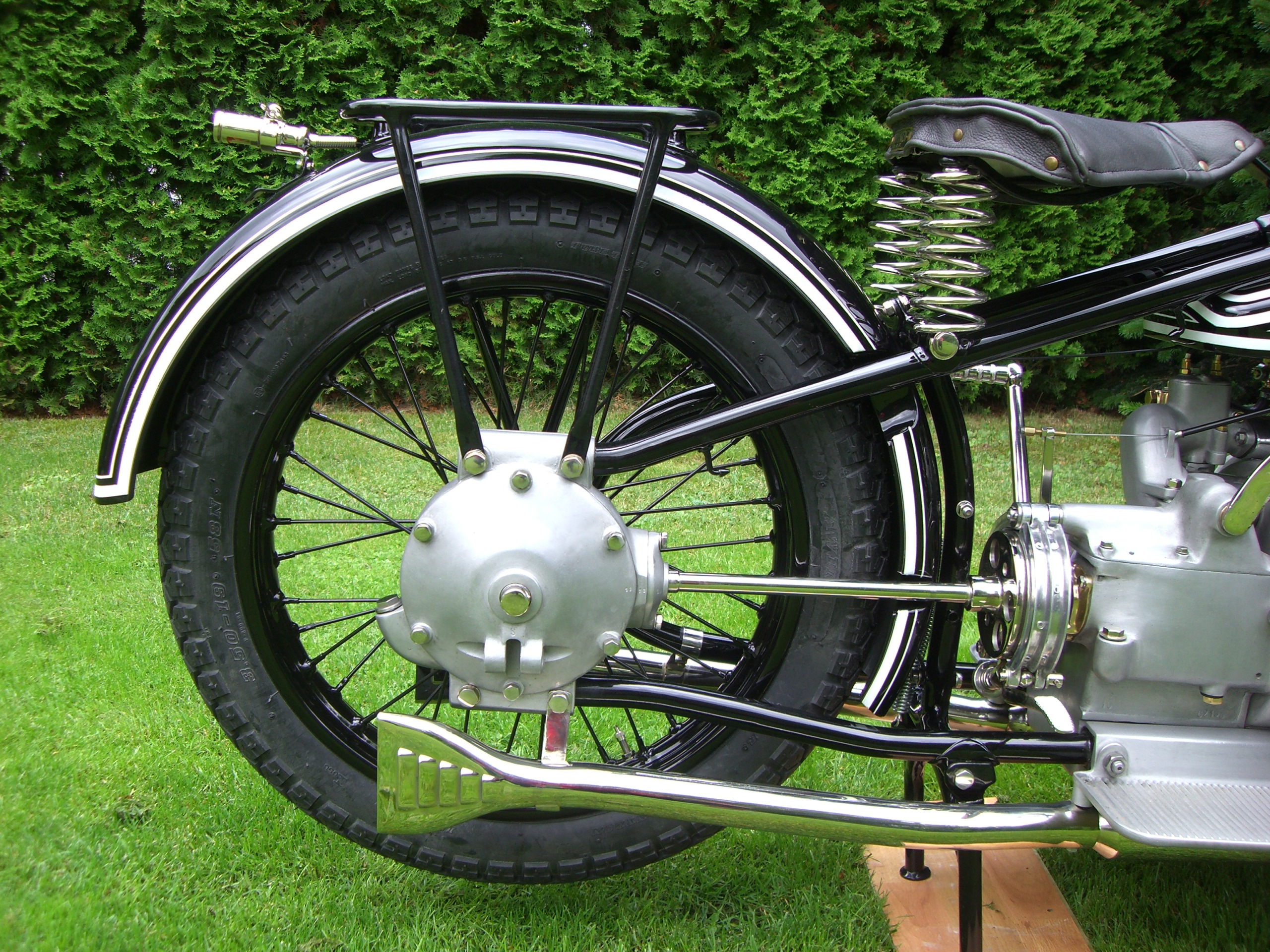 BMW R 62 Antrieb rechts